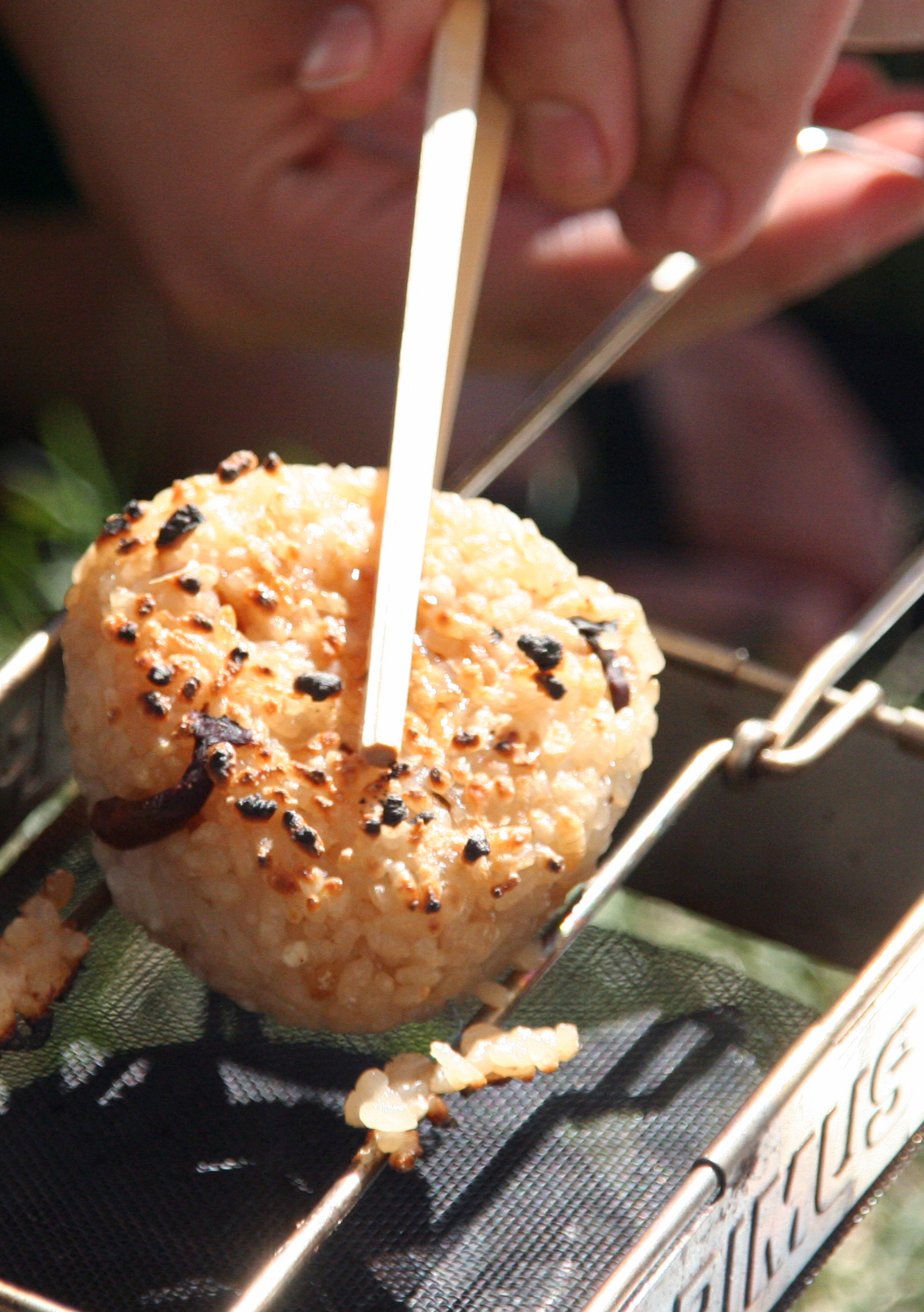 シイタケ焼きおにぎり (静岡県富士宮市、朝霧アリーナ)Toasted rice ball with mushroom